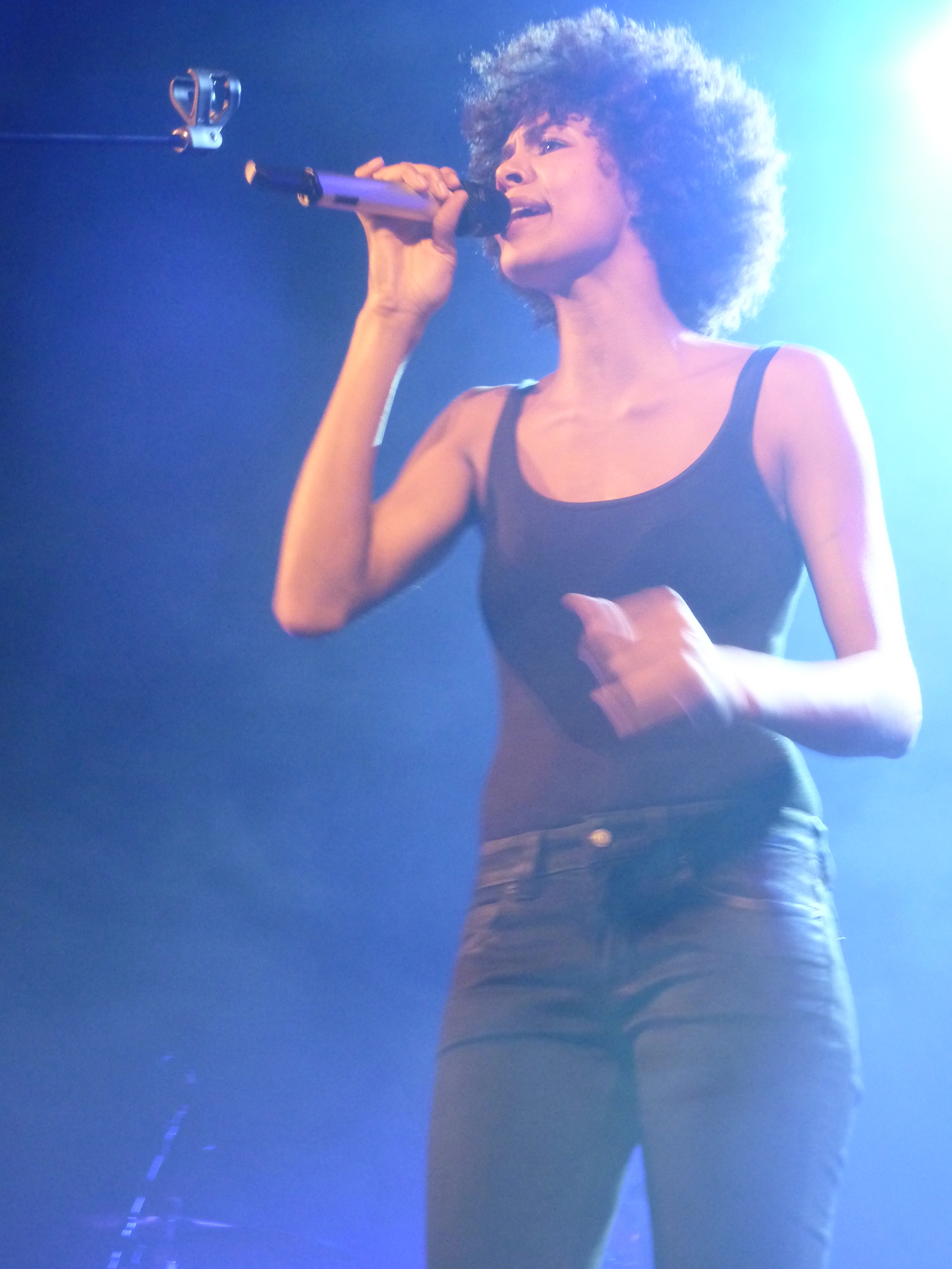 Ayo en concert au Trianon à Paris le 21 Mars 2011